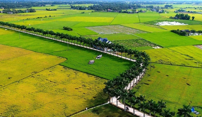 Hàng cau Tân Trụ